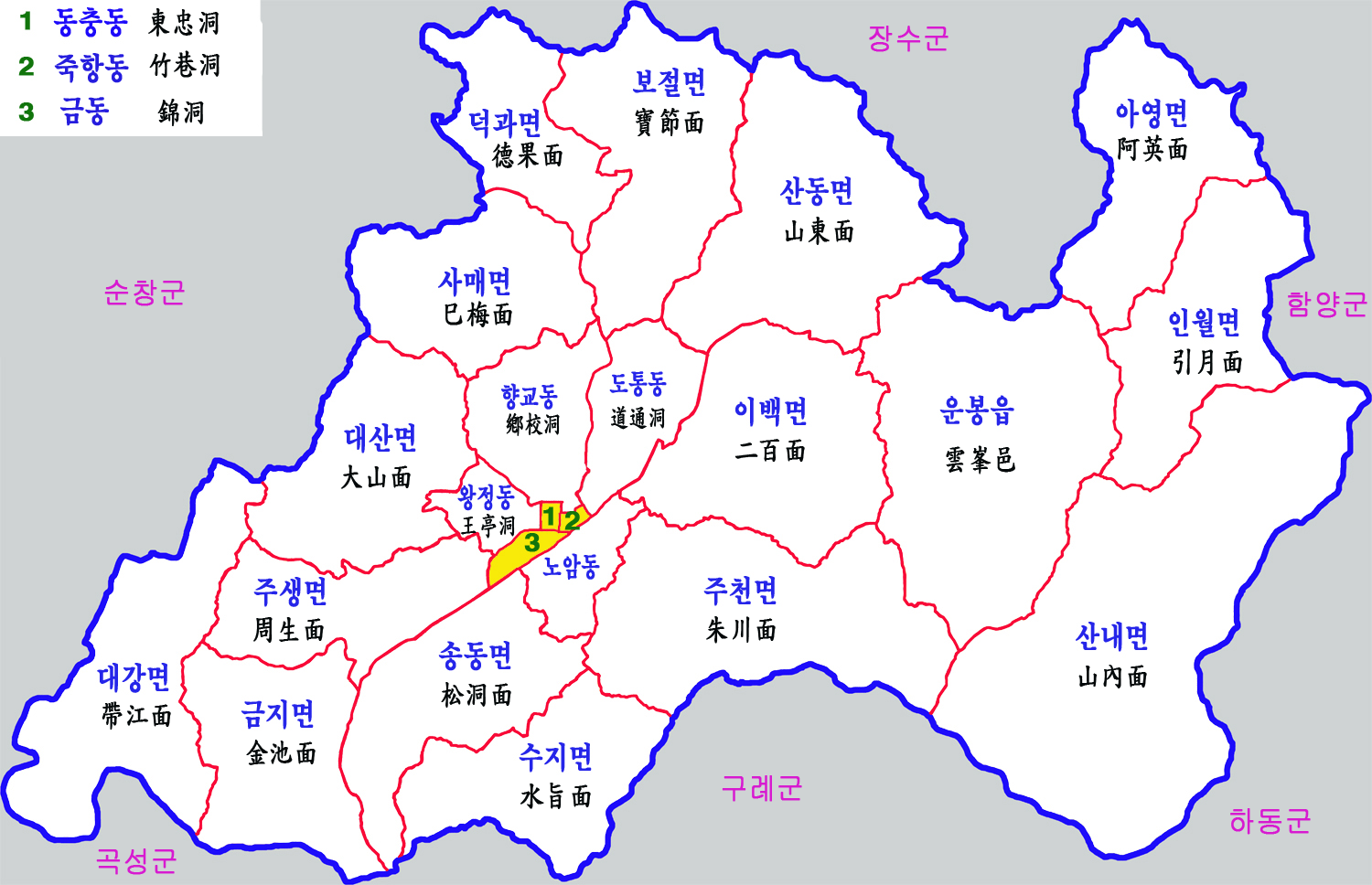 전북 남원시 행정구역도